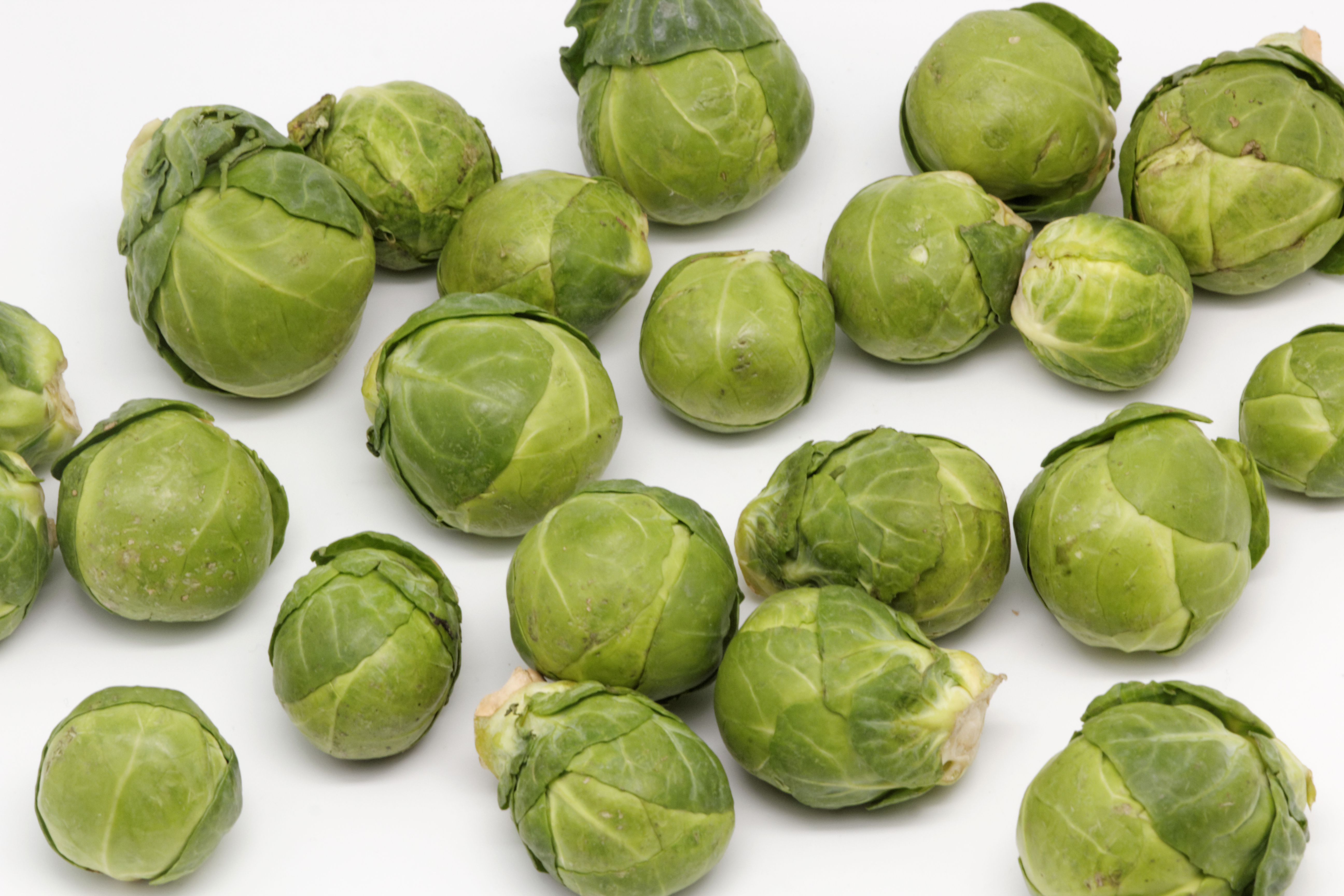 Brassica oleracea var. gemmifera